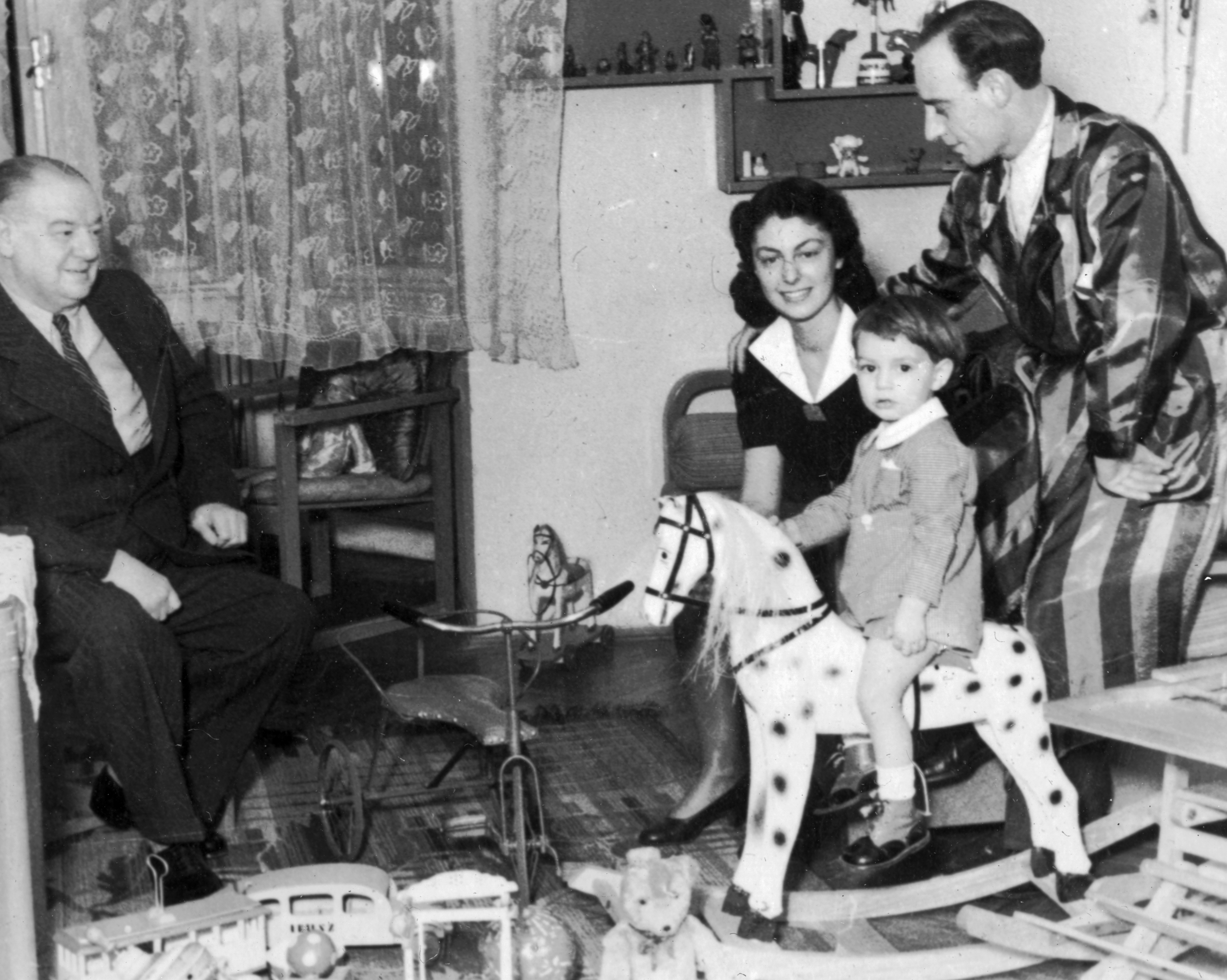 Latabár Kálmán színművész és felesége, előttük kisfiúk, balra édesapja, id. Latabár Árpád színművész. Location: Hungary Tags: toy, celebrity, interior, hobby horse, tricycle, family, teddy bear, model car Title: Latabár Kálmán színművész és felesége, előttük fiúk, balra édesapja, id. Latabár Árpád színművész.